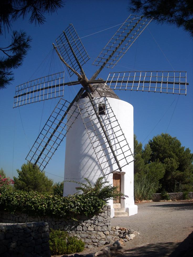 Molino de Puig d'en Valls